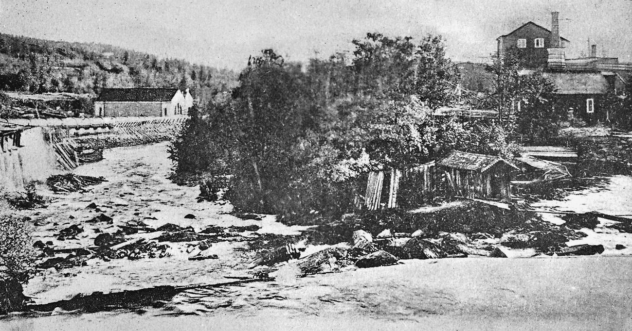 Ludvika bruk och kraftverk. Vy över hytta (t.h.) och kraftstation (t.v.)